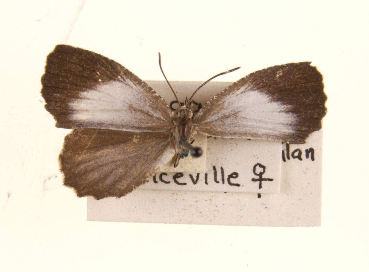 L.distanti = massalia